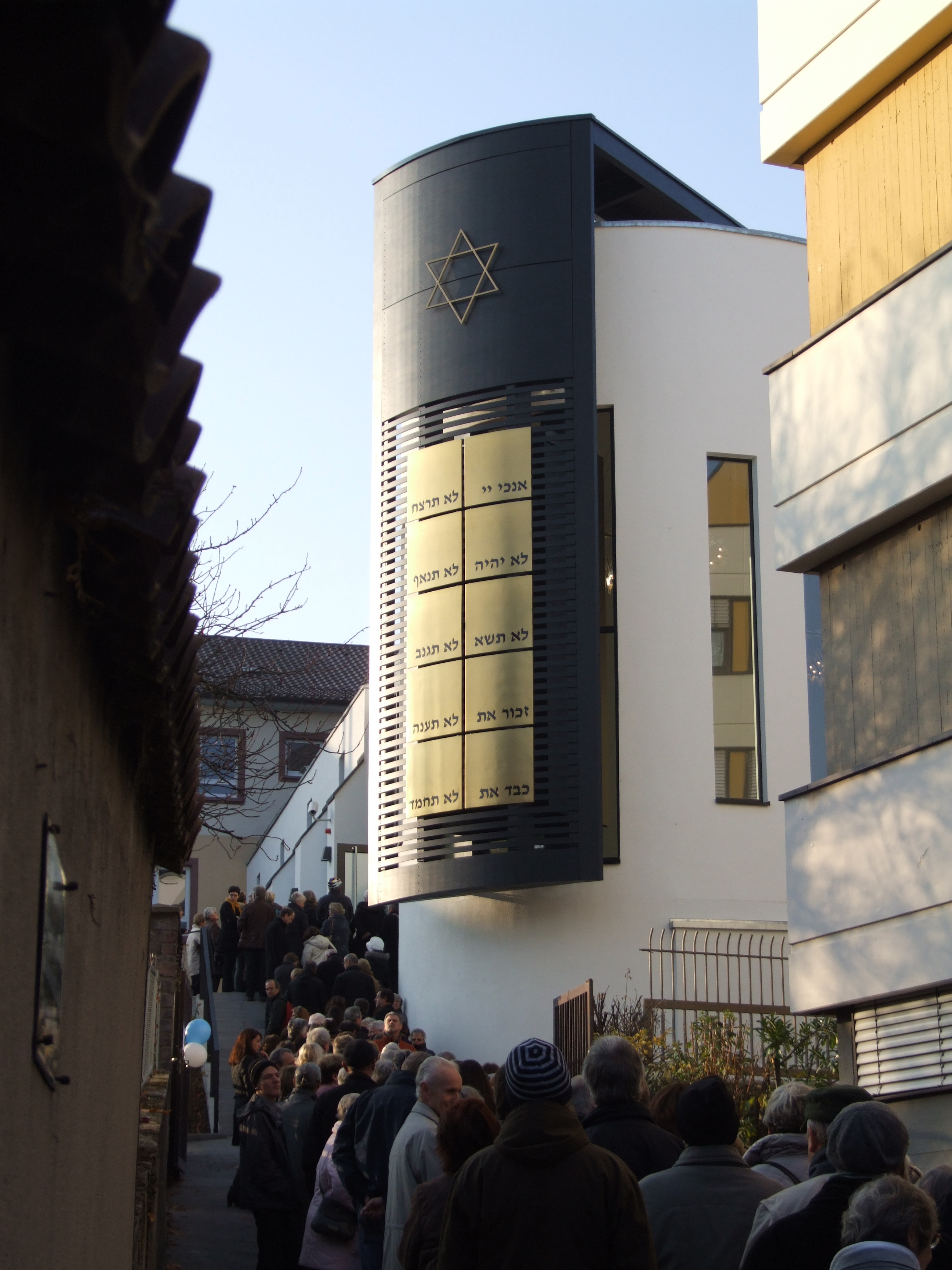 Synagoge Beith-Schalom in Speyer, Tag der offenen Tür am Sonntag, den 13.11.2011 kurz nach der Einweihung am 9.11.2011. Davor Warteschlange von interessierten Bürgern.